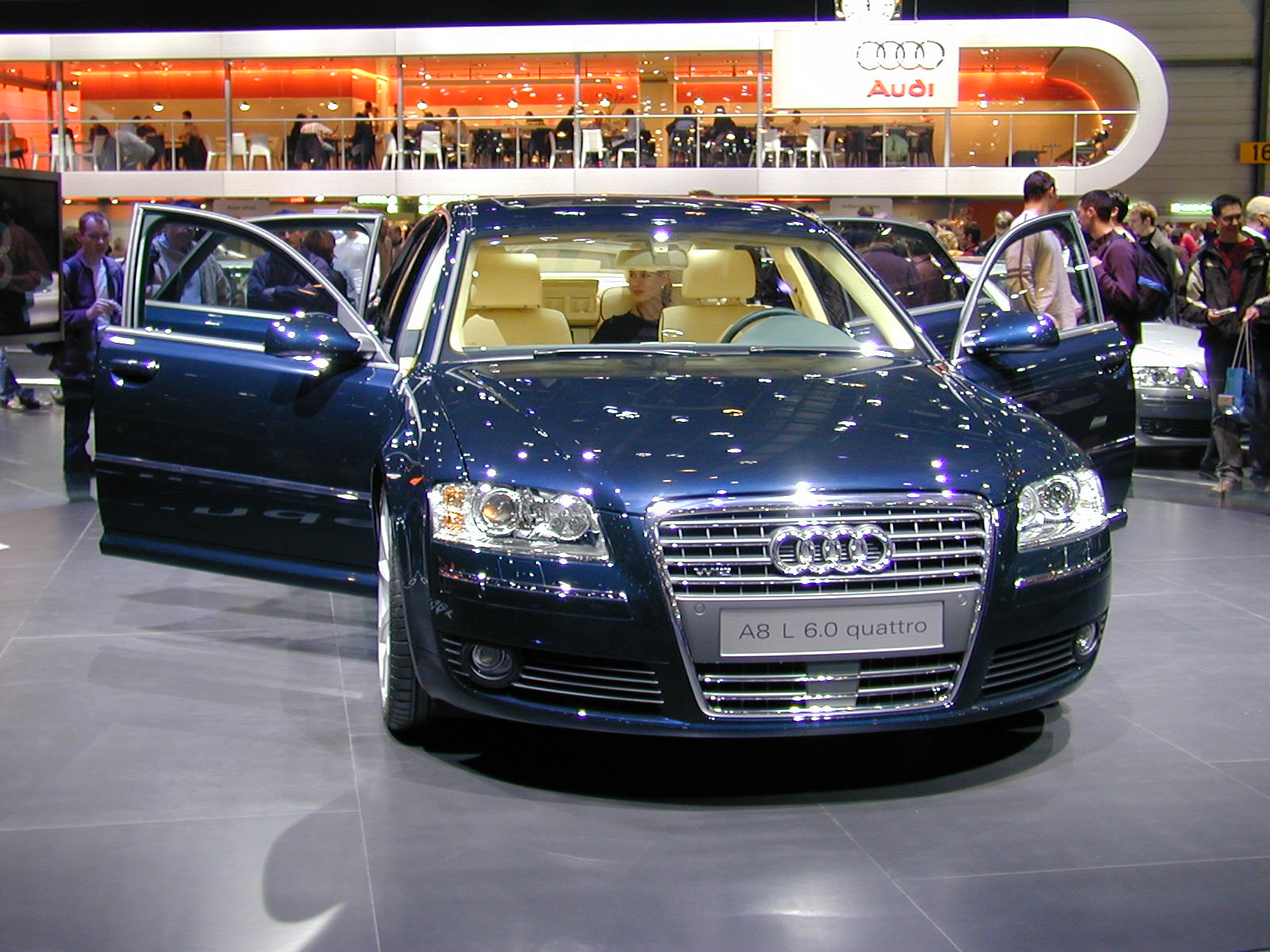 Salon de Genève 2004 SAG2004 082 Audi A8